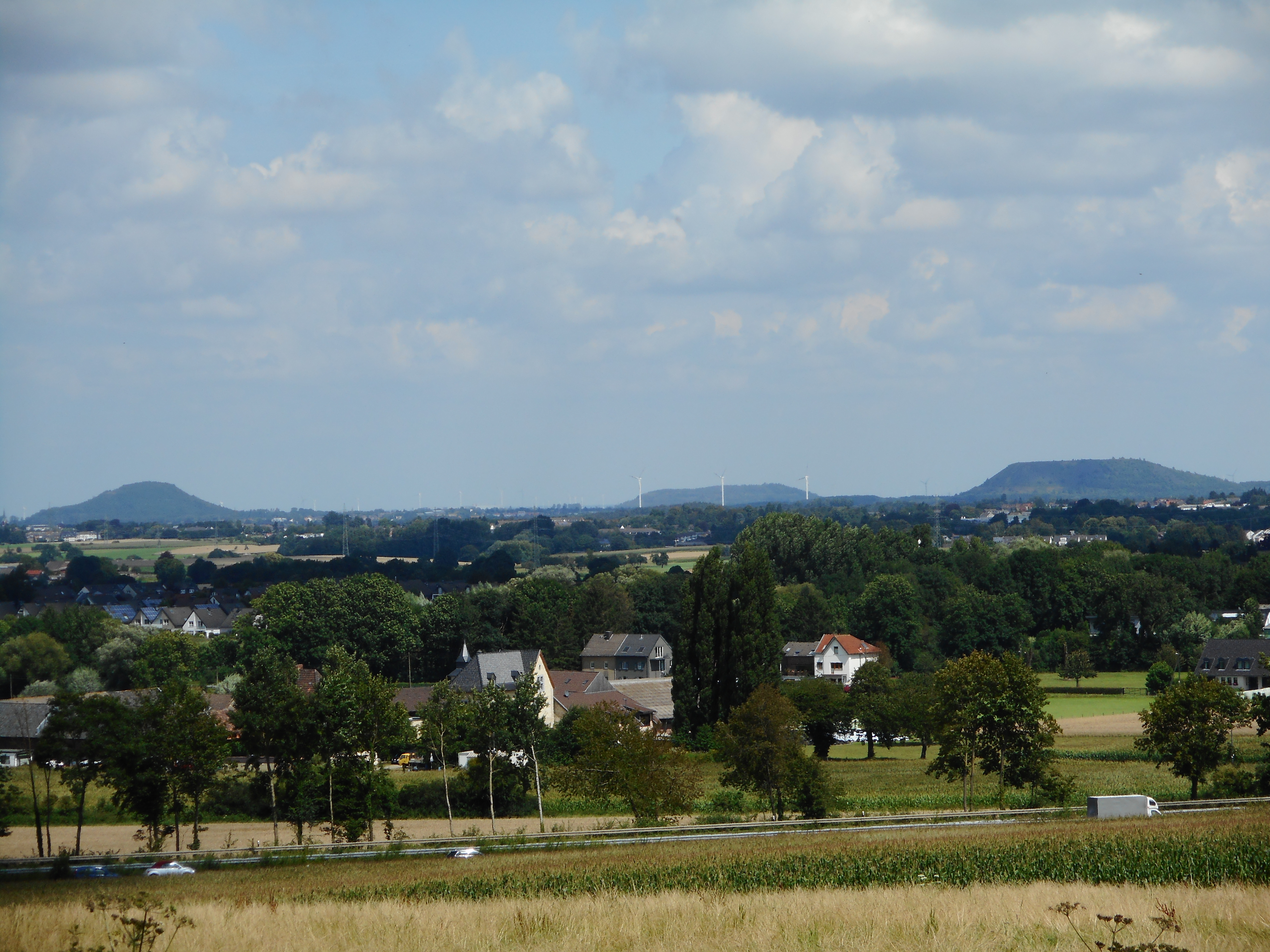 Blick von Vetschauer Berg auf die Bergehalden im Aachener Revier